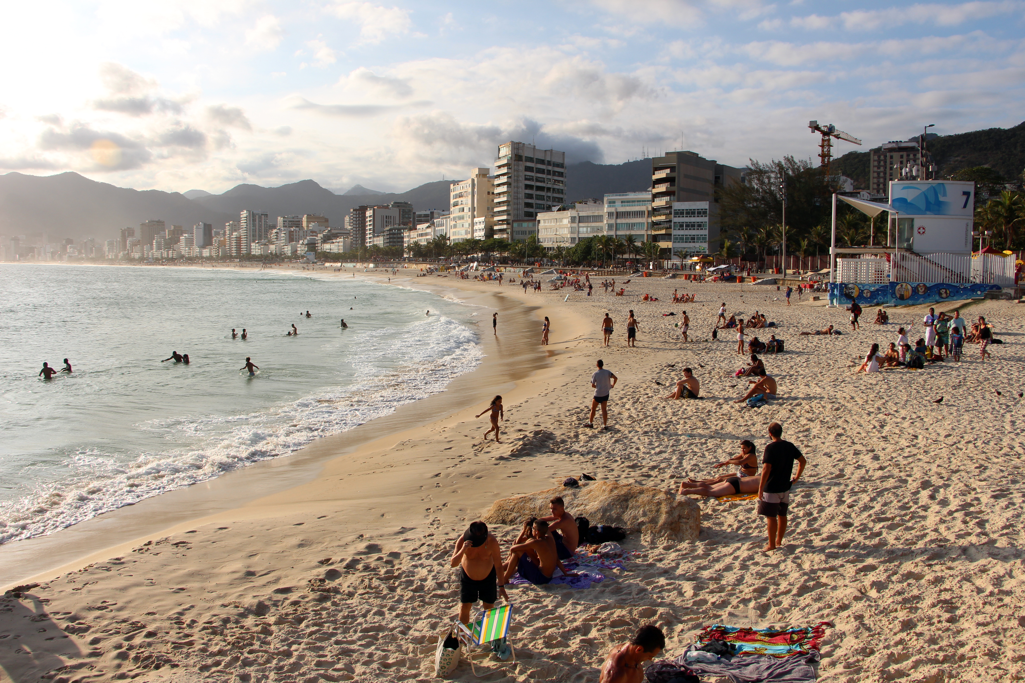 Rio de Janeiro